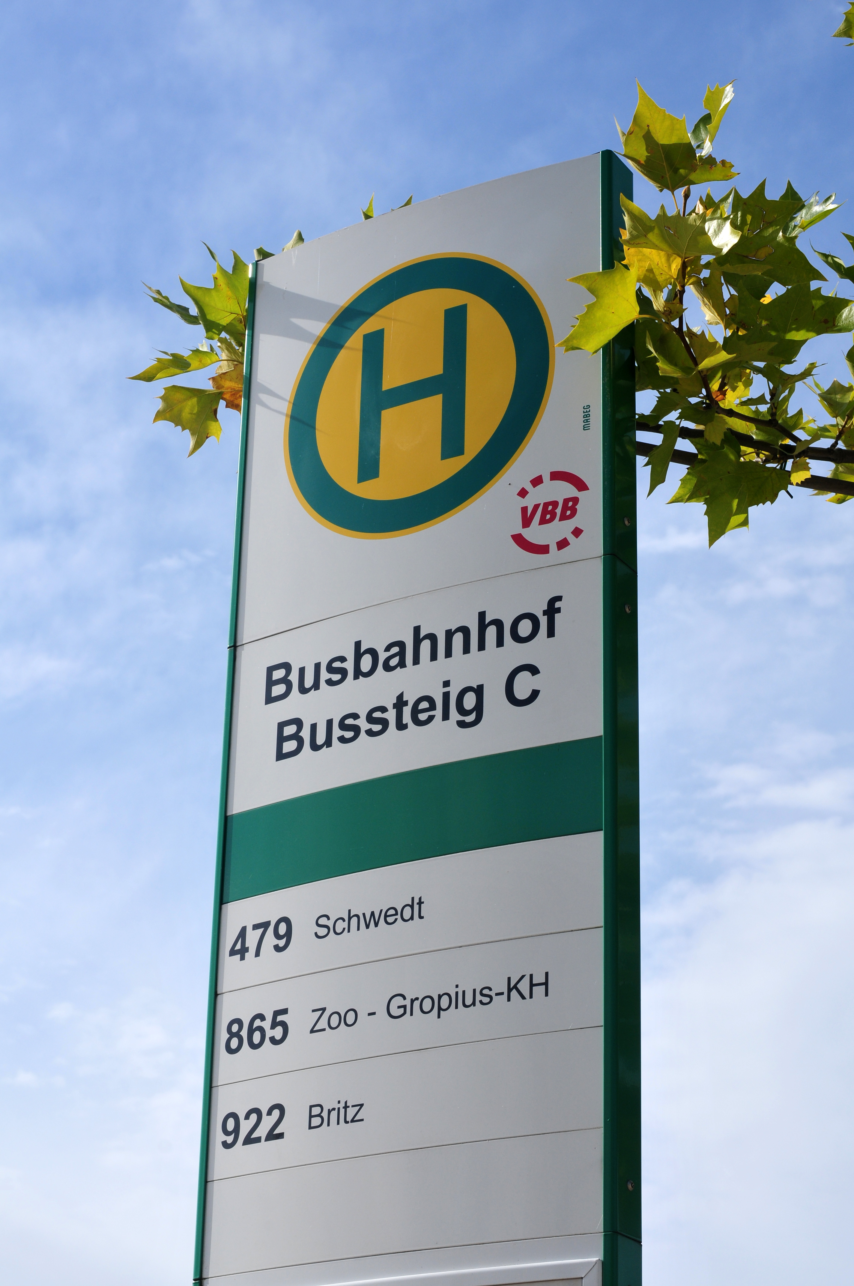 Eberswalde